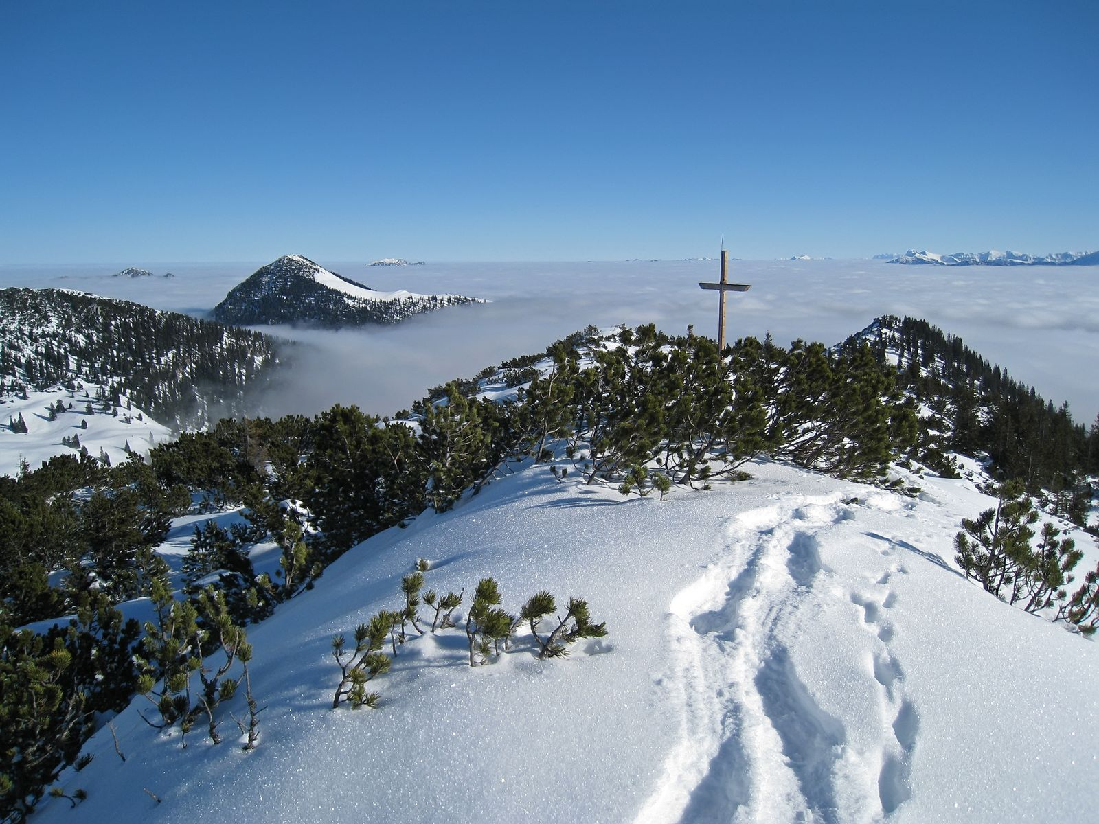 Klaffen Gipfelkreuz